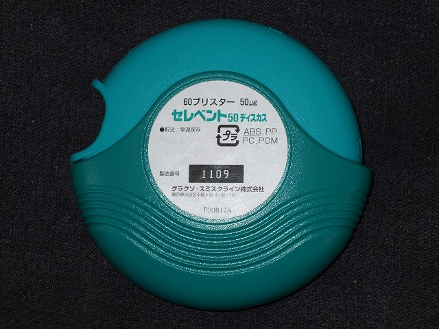 セレベント ディスカスを撮影